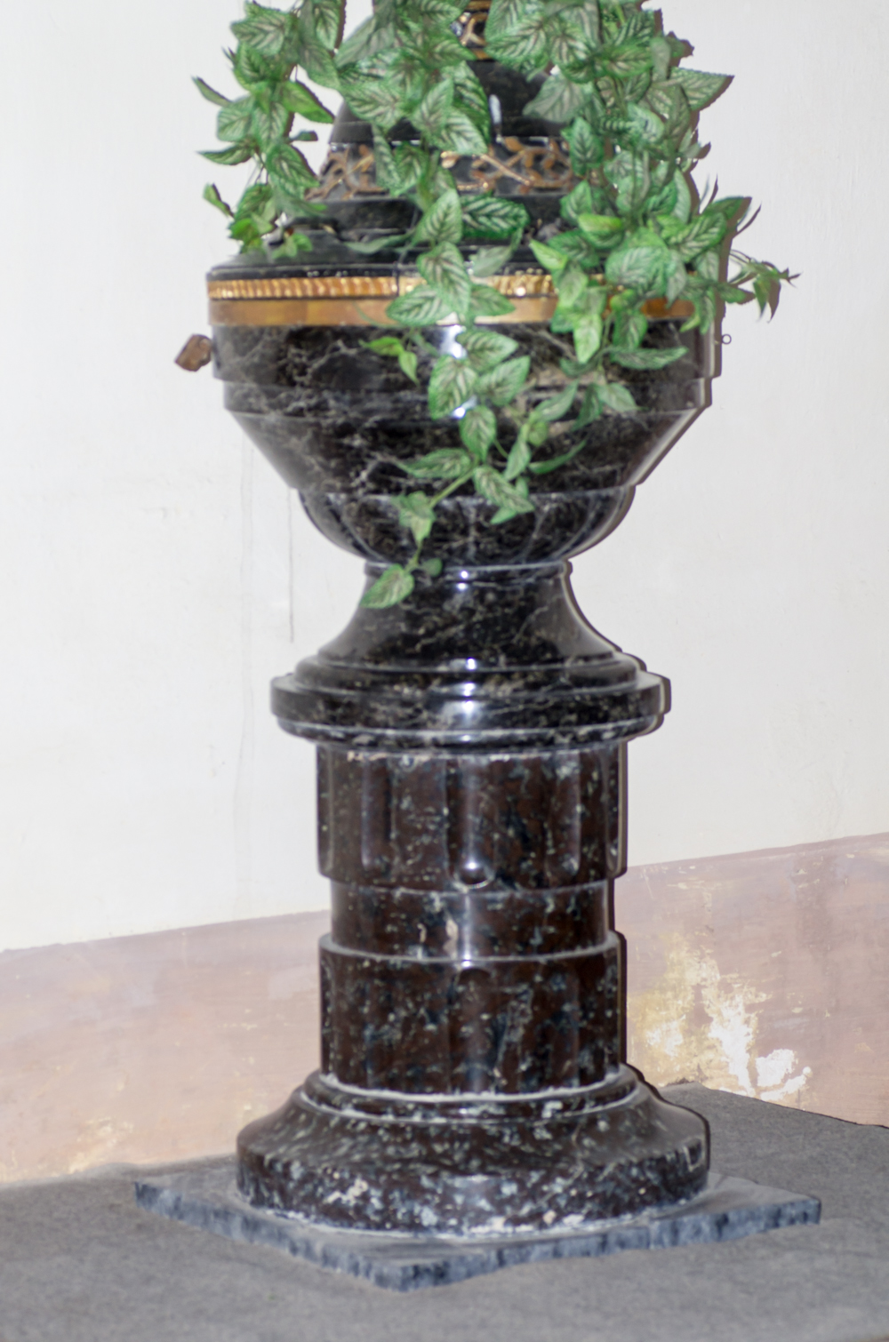 křtitelnice z hadce umístěná v kostele sv. Petra a Pavla v Mnichově, okres Cheb